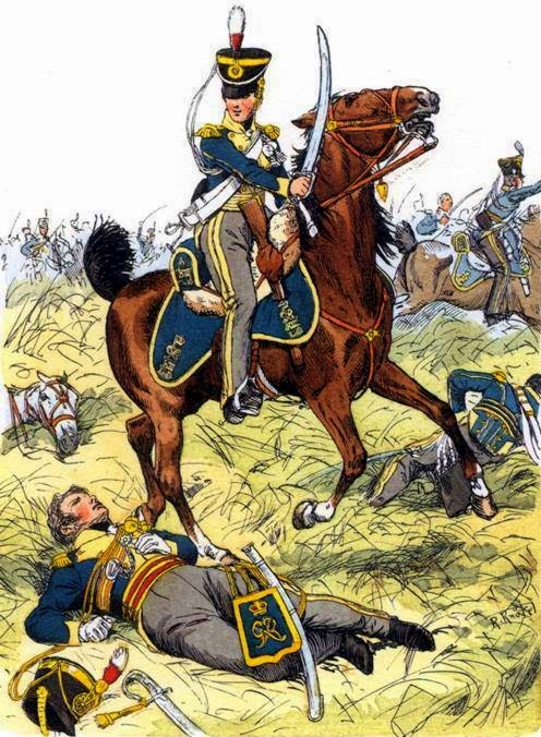 Dragons légers britanniques, 1813-1815.